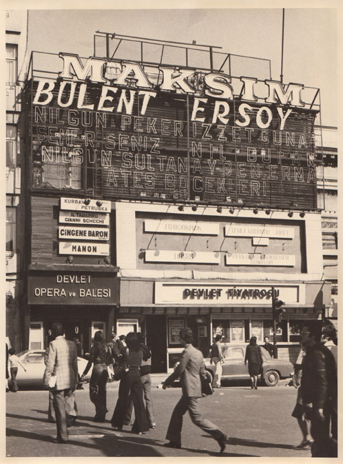 Maxim night club, 1970-1980s SALT Research, Hayati Tabanlıoğlu Archive Maksim Gazinosu, 1970-1980’ler SALT Araştırma, Hayati Tabanlıoğlu Arşivi